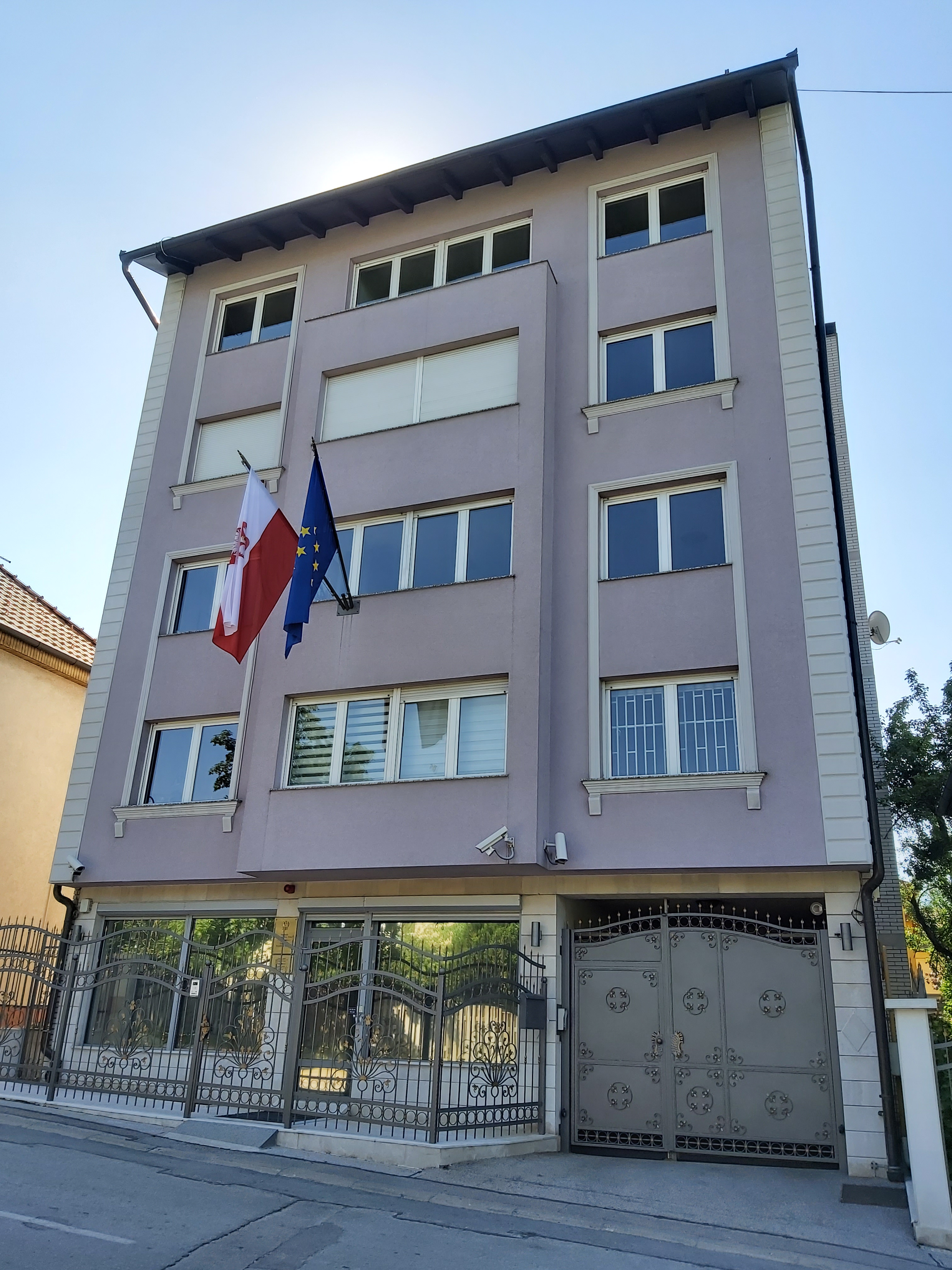 Ambasada RP w Sarajewie